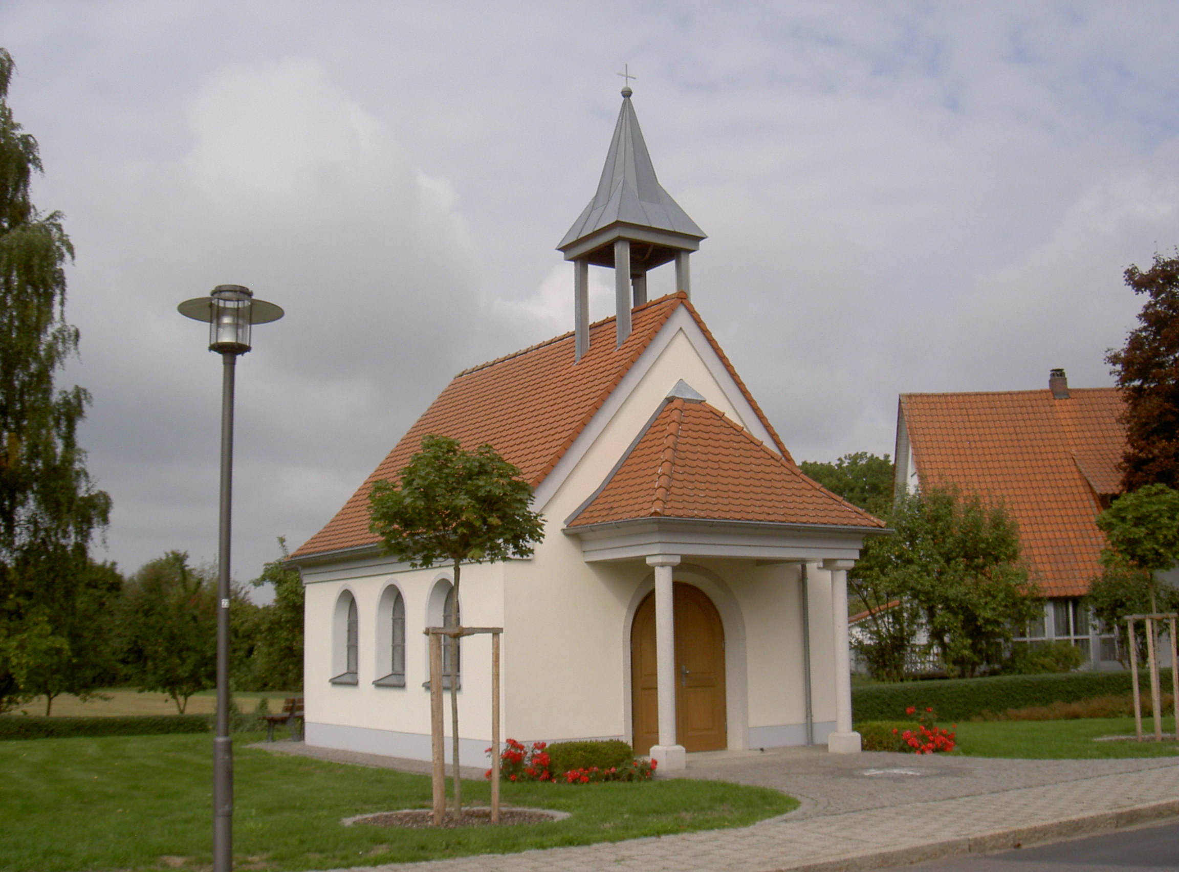 Dorfkapelle (Obertresenfeld)